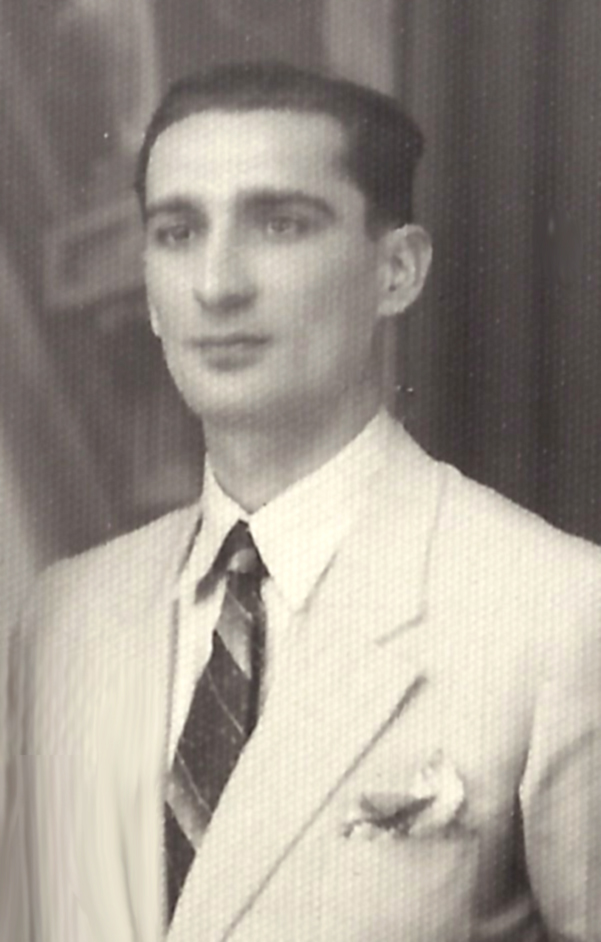 Alcides Longhi